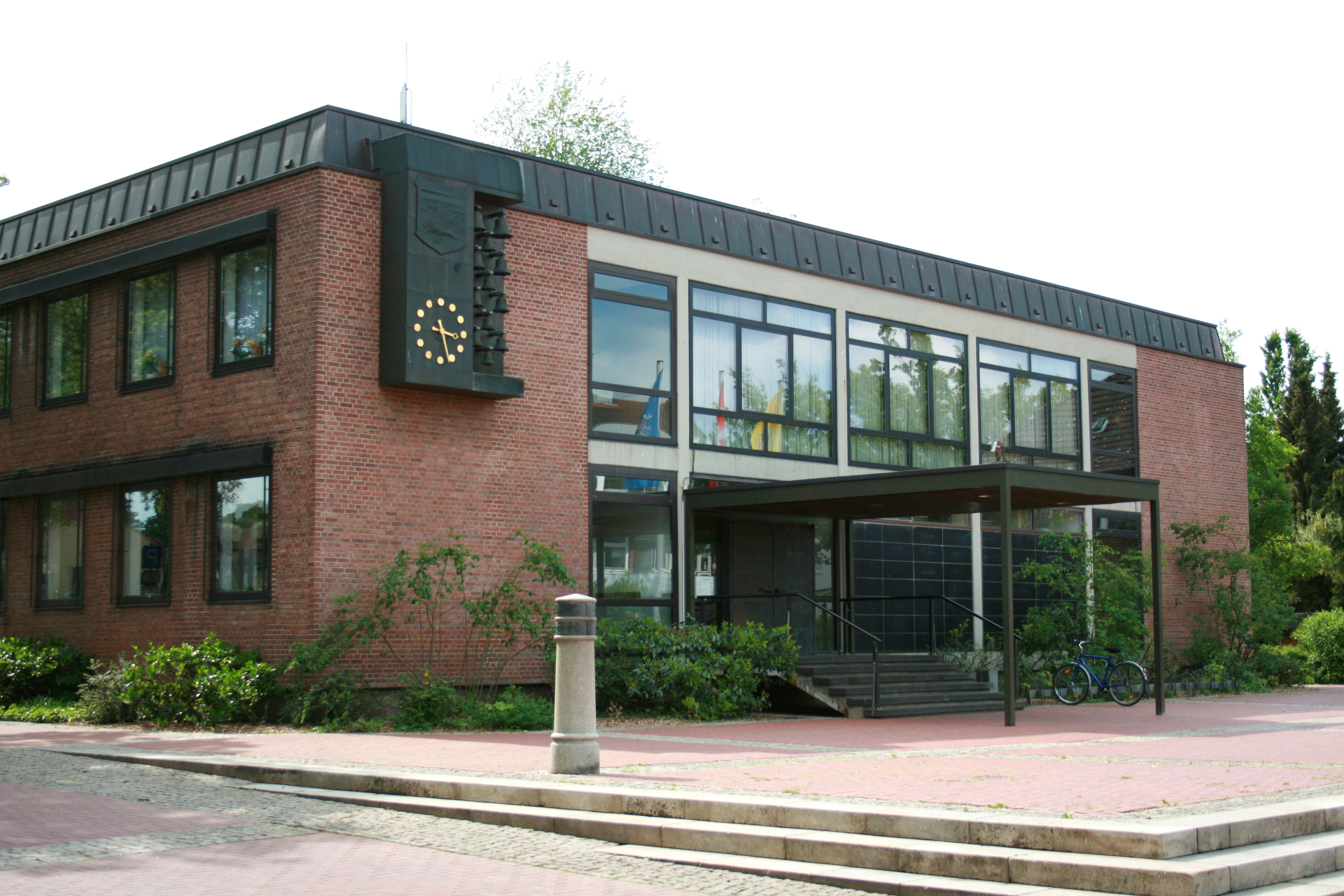 Rathaus auf der Wilhelm-Bockelmann-Straße in Munster (Örtze)